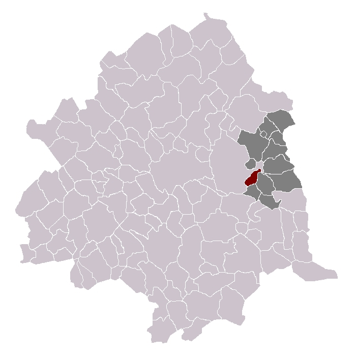 Tressin dans son canton et son arrondissement.